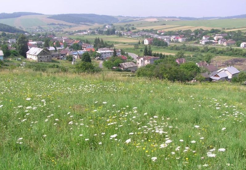 DescriptionCelkový pohľadDate25 June 2006SourceOwn workAuthorAndrej BelovežčíkPermission (Reusing this file) anoCelkový pohľad